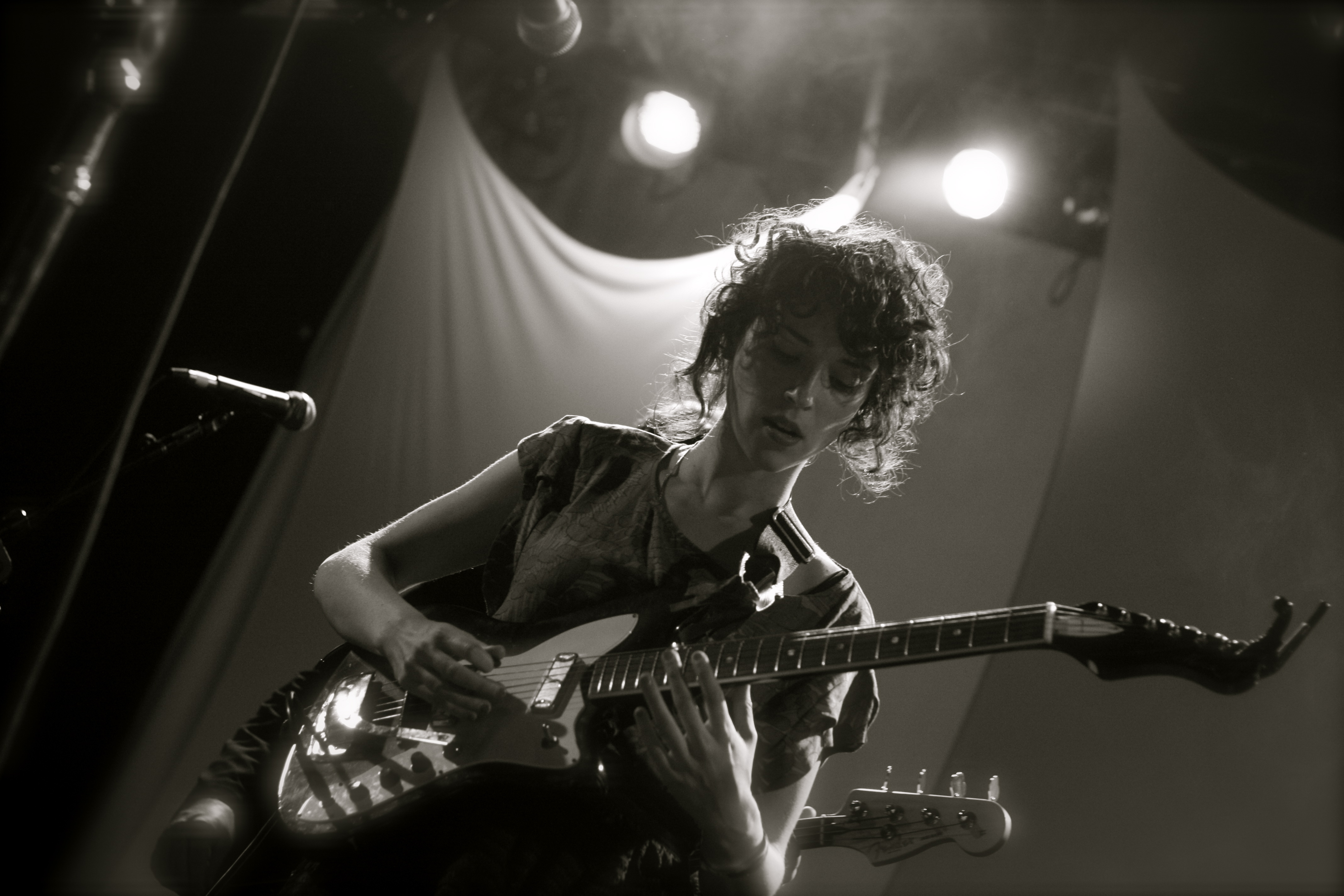 Goddess!